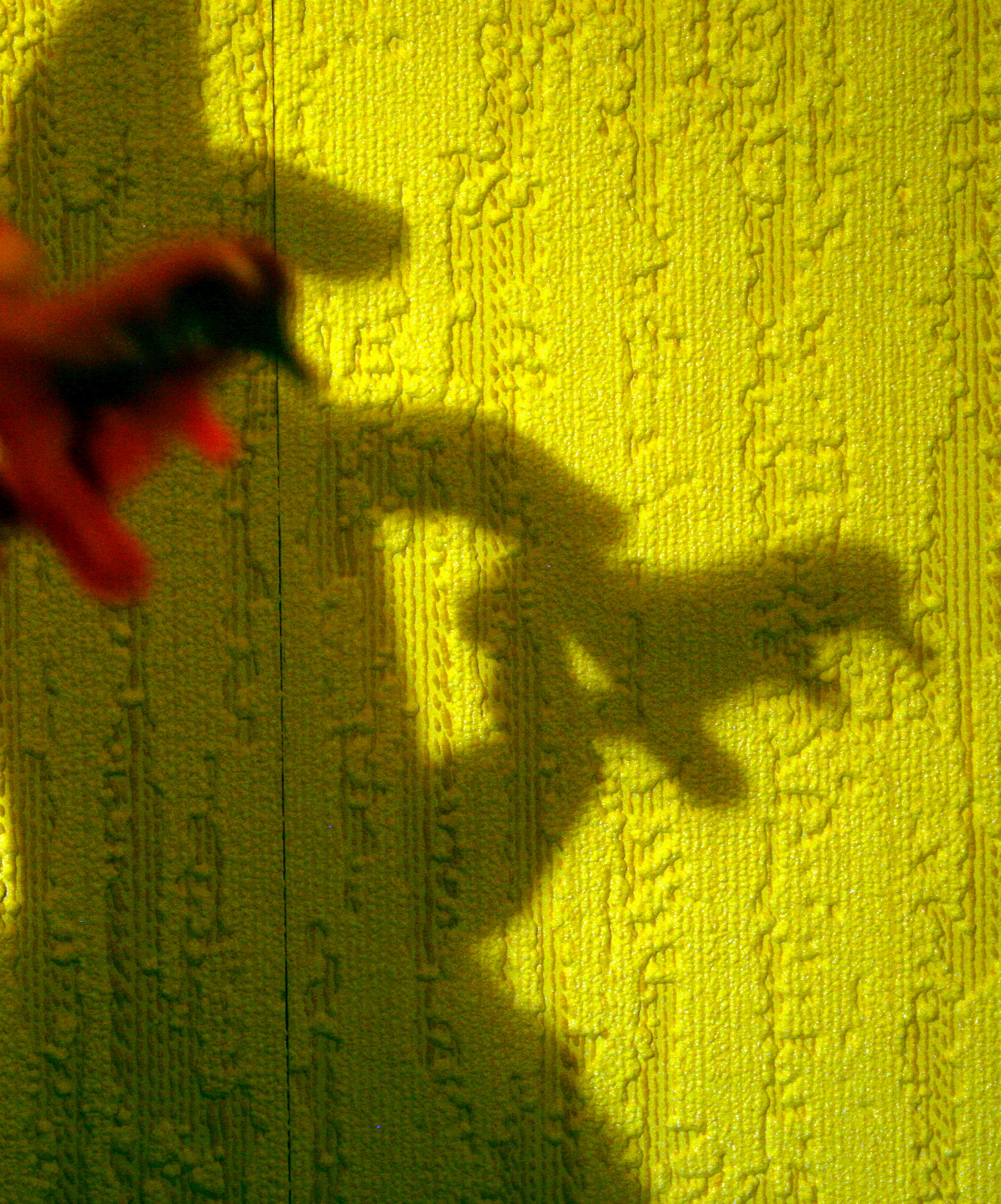 Postać woskowa (Andrzejki 2008)